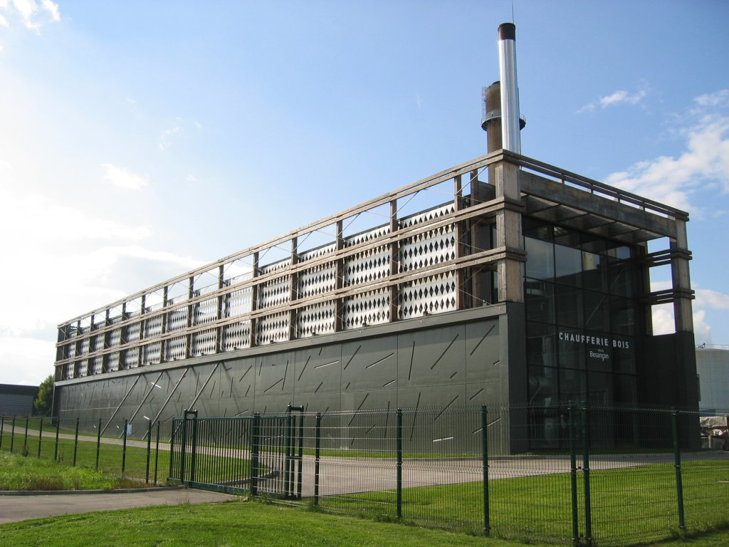 Chaufferie municipale bois de Besancon - Franche Comté - France